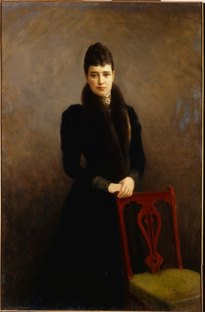 Мария Федоровна. Портрет работы И.С. Галкина, 1904.